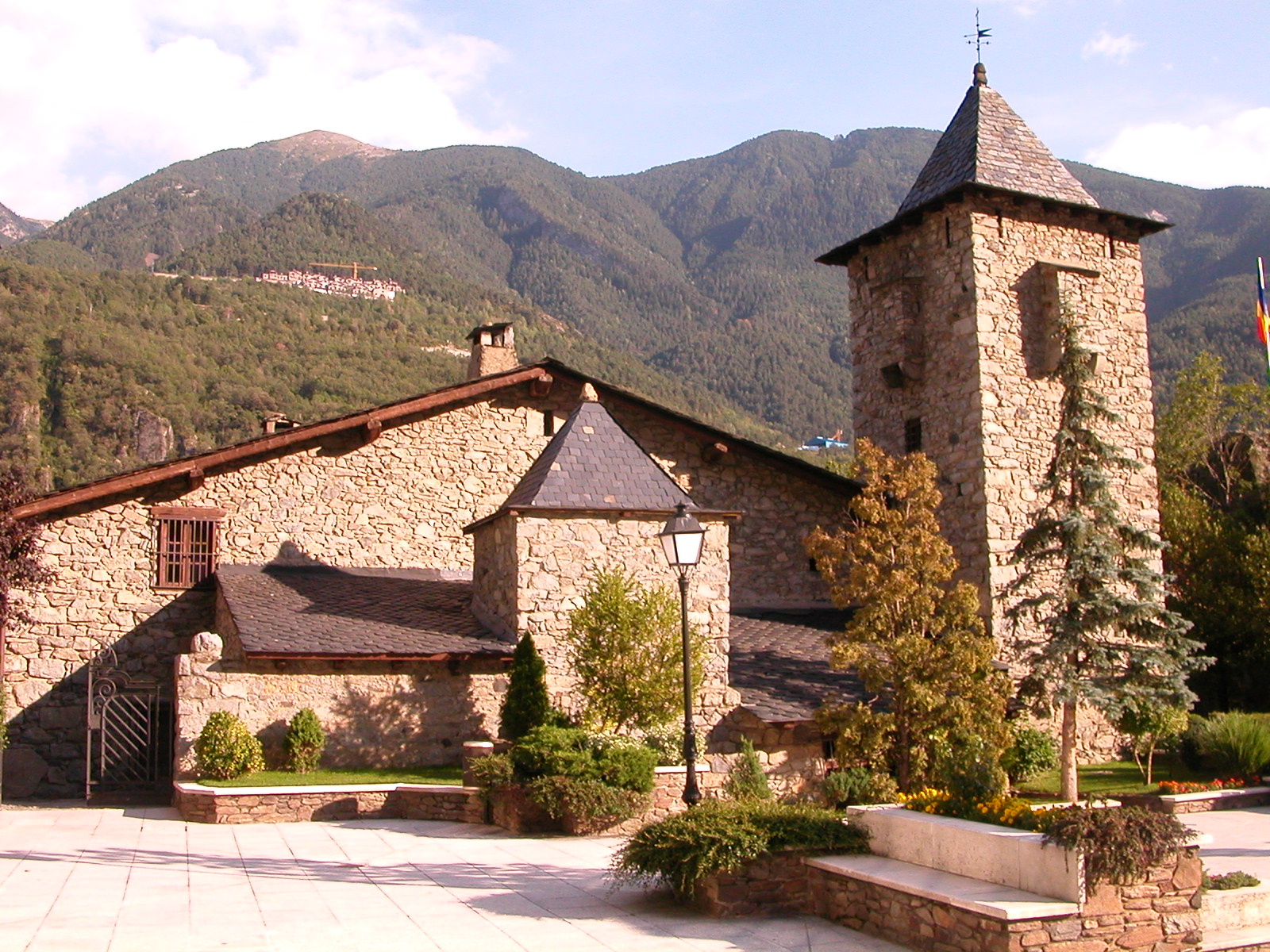 Parliament, Andorra la Vella, Andorra